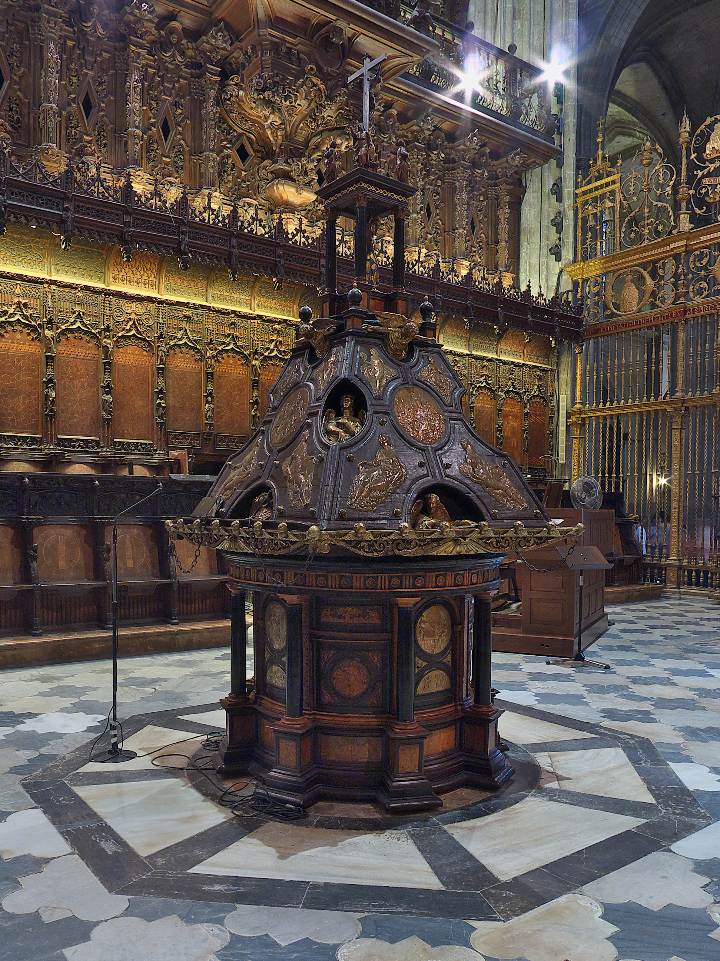 Hernán Ruiz el Joven diseña el facistol (1560-1565), para uso de la importante capilla musical de la catedral hispalense, bajo cánones renacentistas. El maestro mayor de carpintería, Alonso Ruiz, y los expertos Juan Bautista Vázquez el Viejo, Bartolomé Morel, Alonso Hernández de Córdoba, Magnus Homan, y otros, contribuyen con esta obra al mobiliario litúrgico catedralicio.